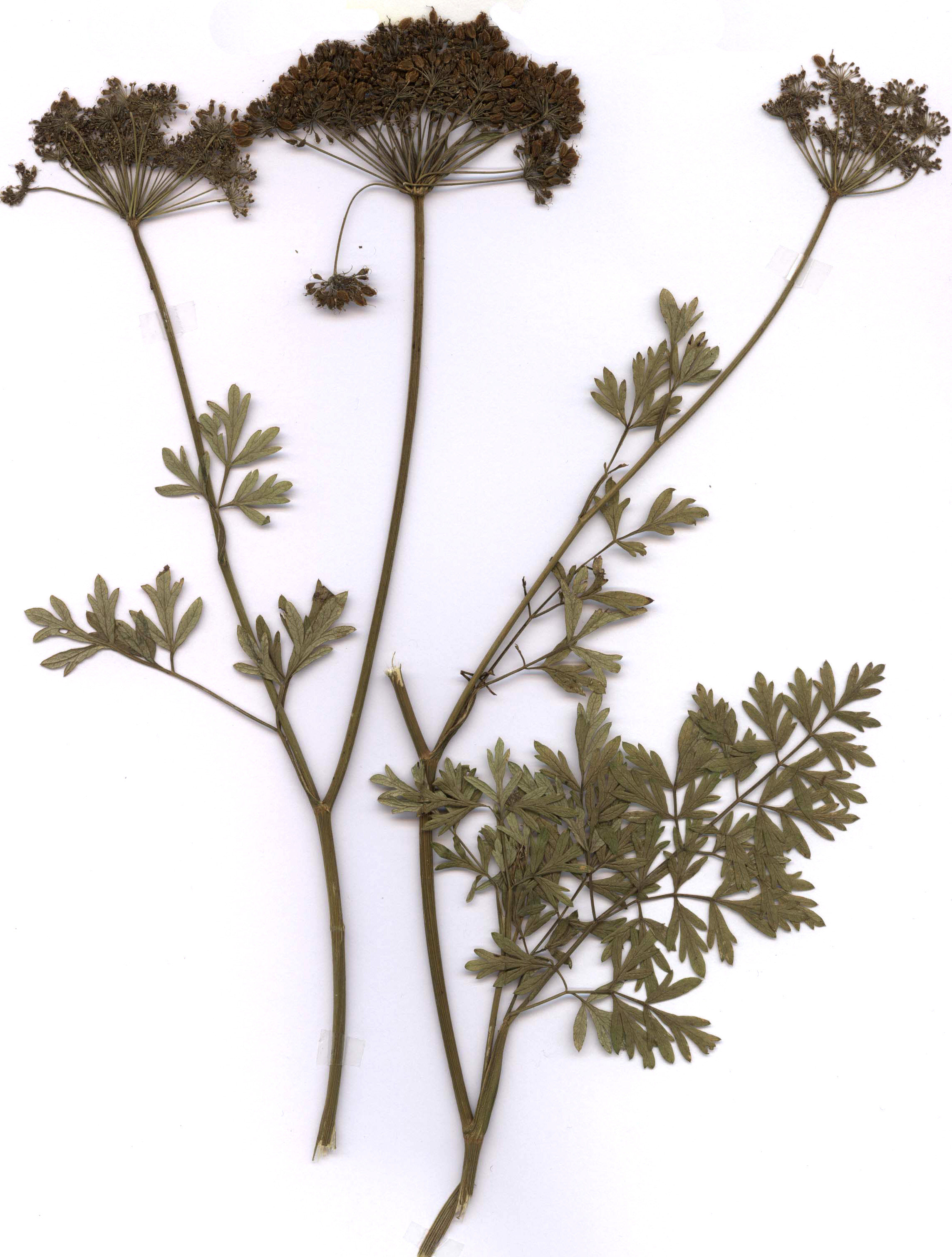 Cnidium silaifolium, eigener Herbarbeleg von 1986, Unterfranken